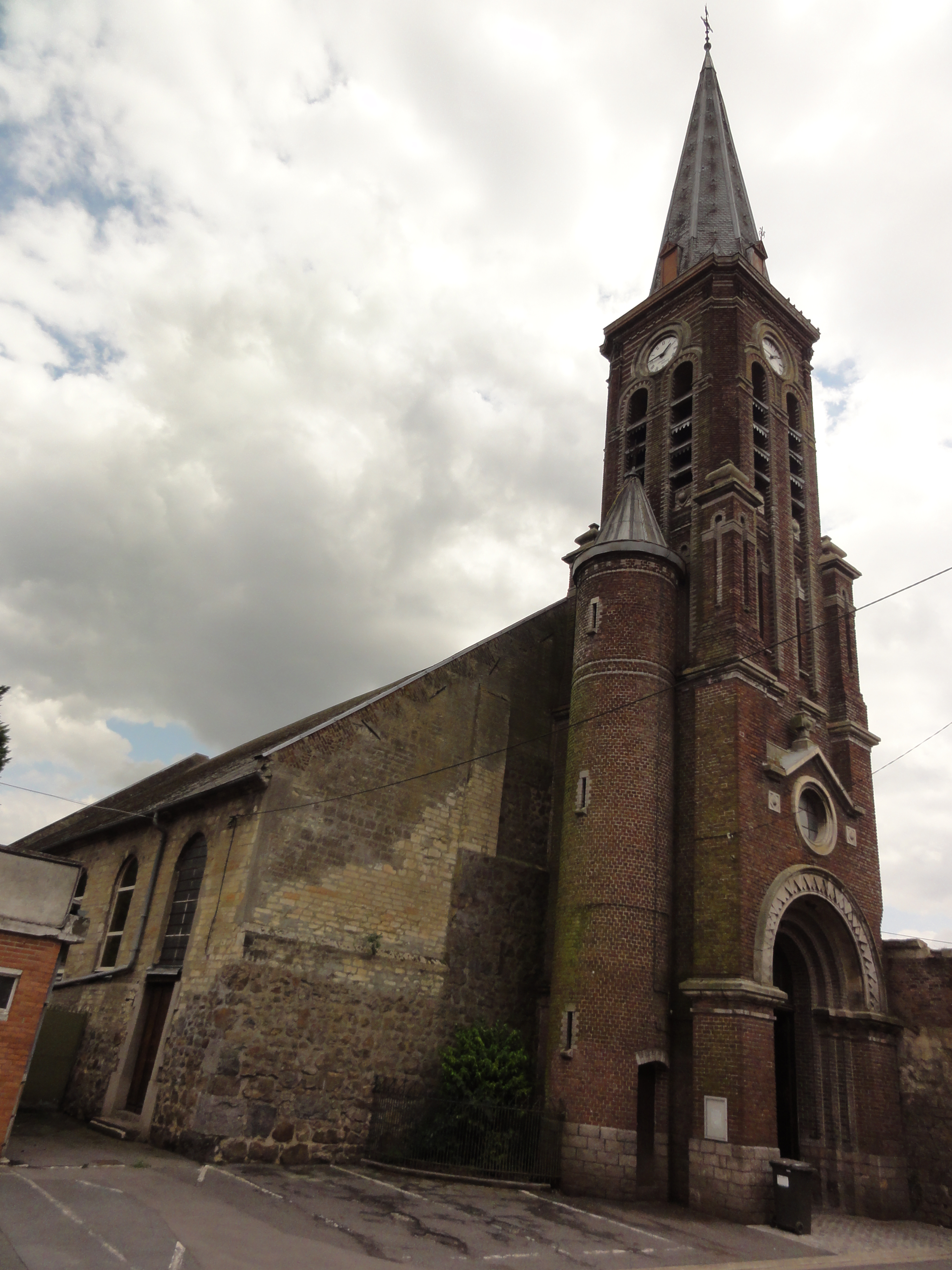 Haspres (Nord, Fr) église